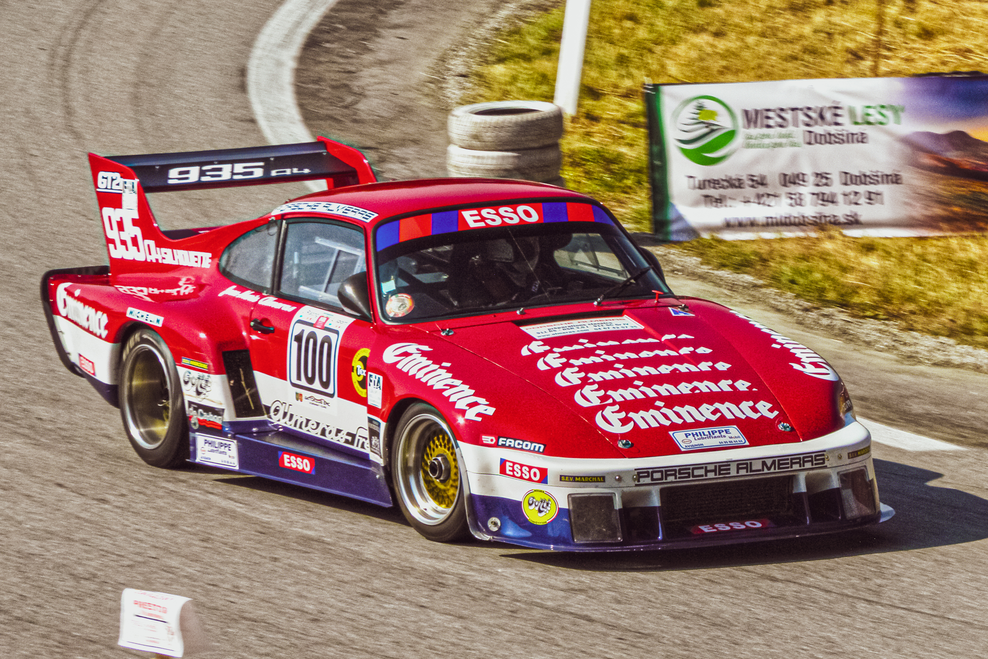 Porsche 935 A4 Silhouette s Jeanom Marie Almérasom za volantom počas pretekov automobilov do vrchu EHCC Dobšinský kopec 2015.